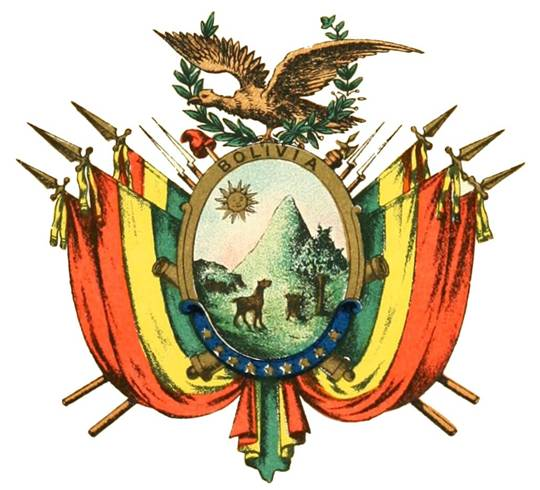 Escudo de Bolivia 1888